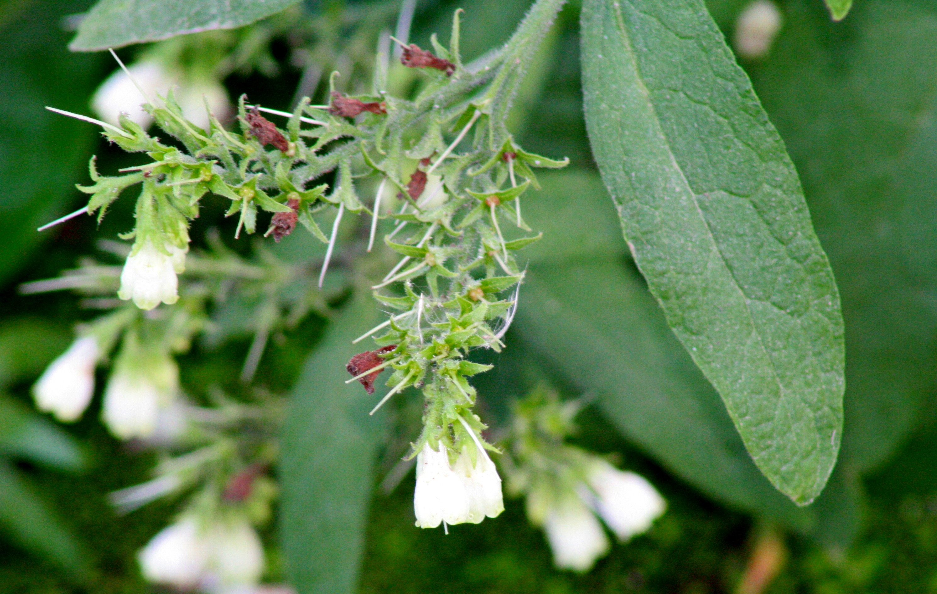 Symphytum_officinale (Consolida maggiore) Località Canizzano (TV), 0 m s.l.m.